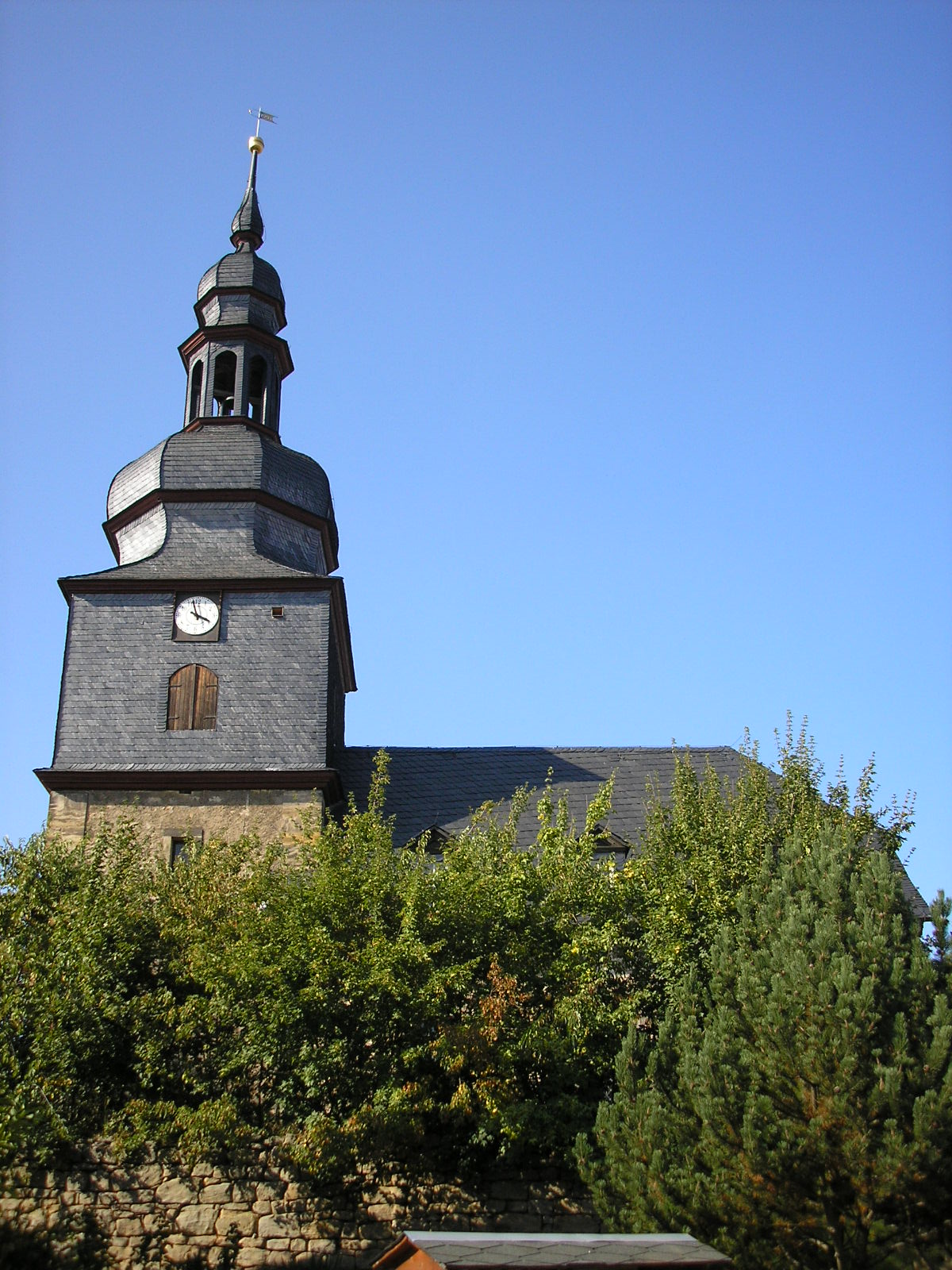 Die Dorfkirche von Neuroda, Ortsteil von Wipfratal im Ilm-Kreis (Thüringen, Deutschland).